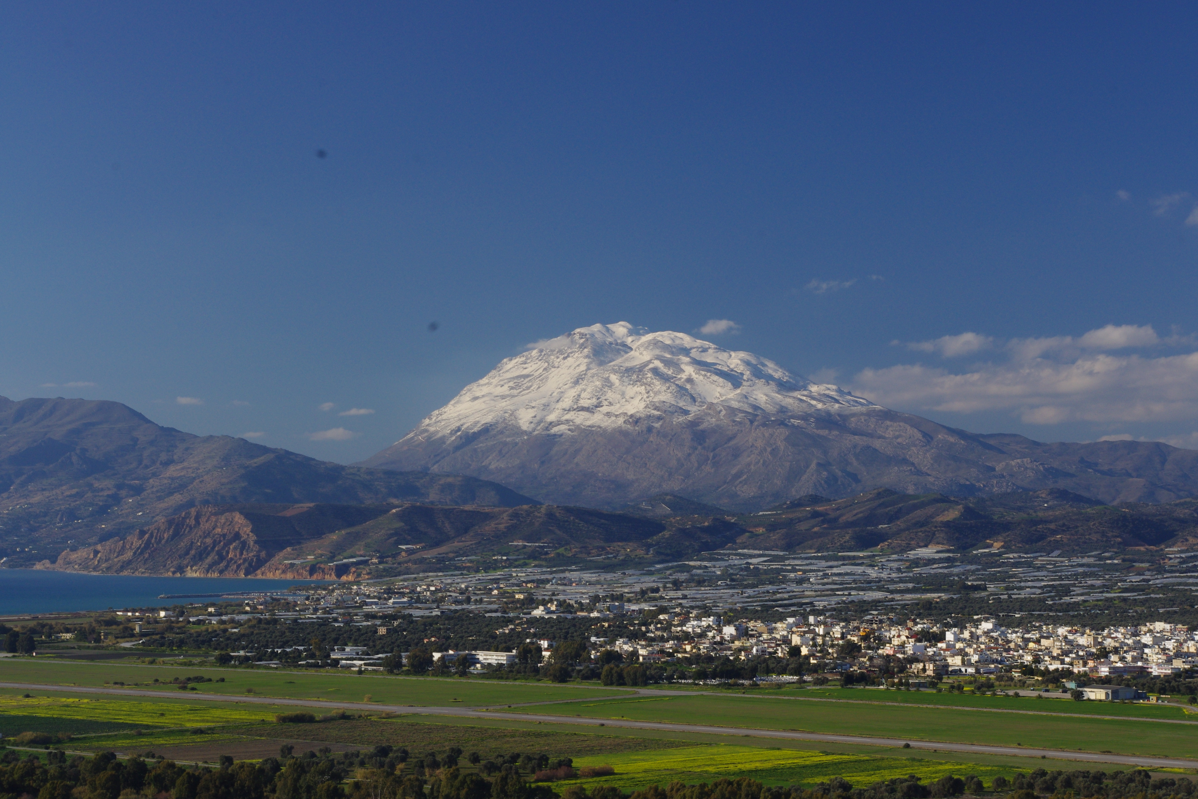 Κέδρος και Τυμπάκι This is a photography of Natura 2000 protected area with ID GR4330002